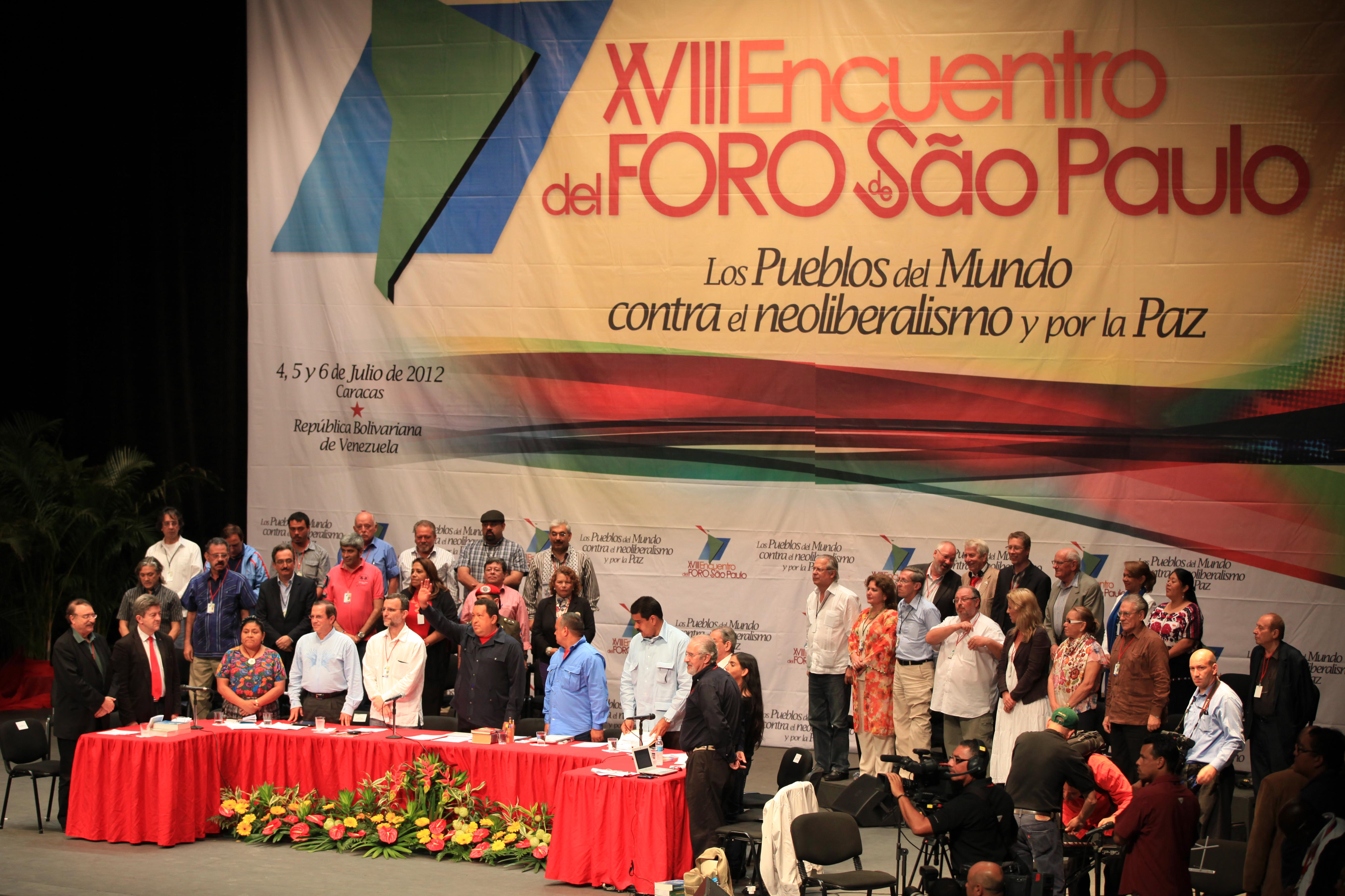 Caracas (Venezuela). 06 Julio del 2012. El Canciller Ricardo Patiño Participa en el XVIII Encuentro del Foro de Sao Paulo como invitado especial .Foto: Xavier Granja Cedeño - Ministerio de Relaciones Exteriores, Comercio e Integración.